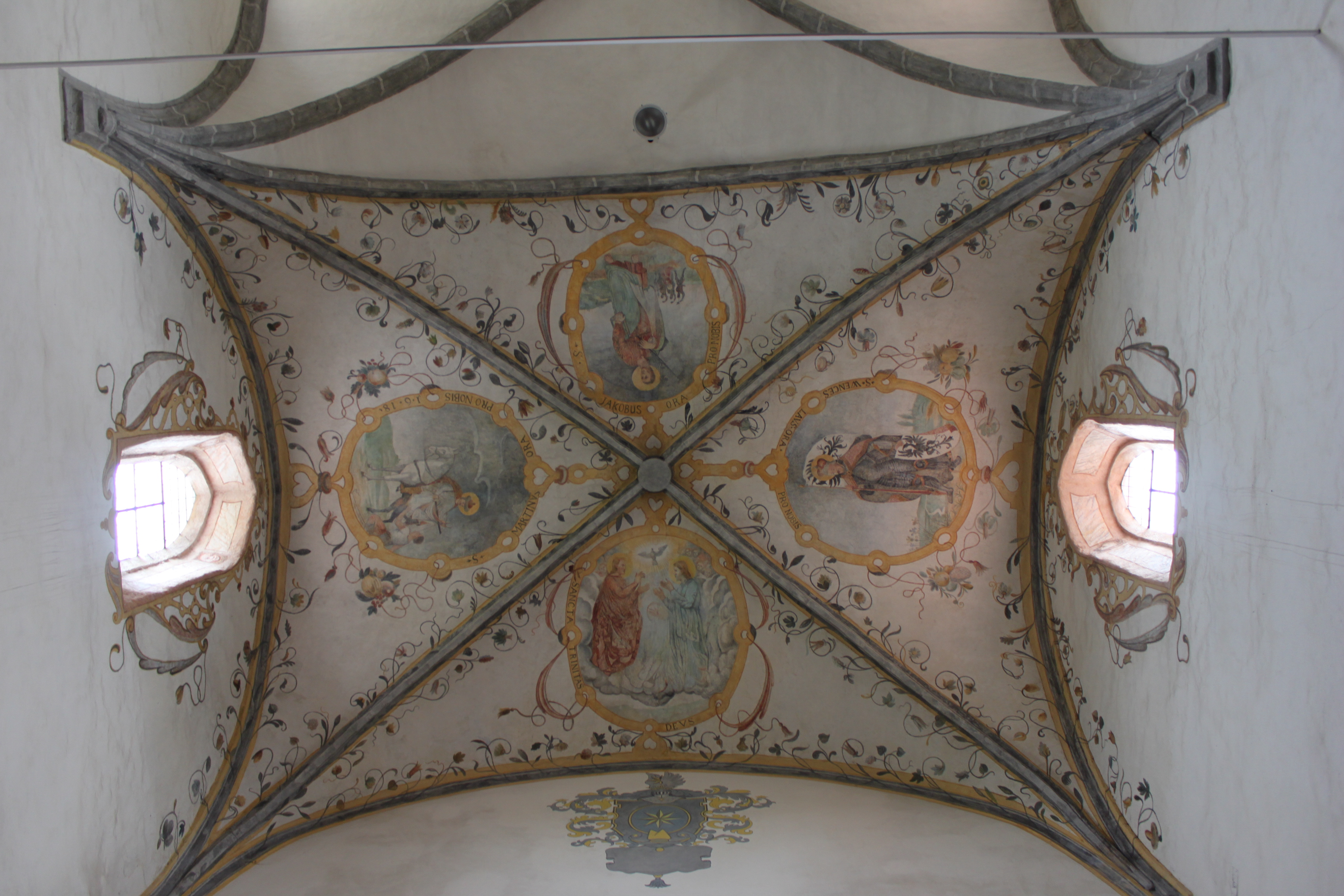 Kostel sv. Jakuba v Nepomuku, strop